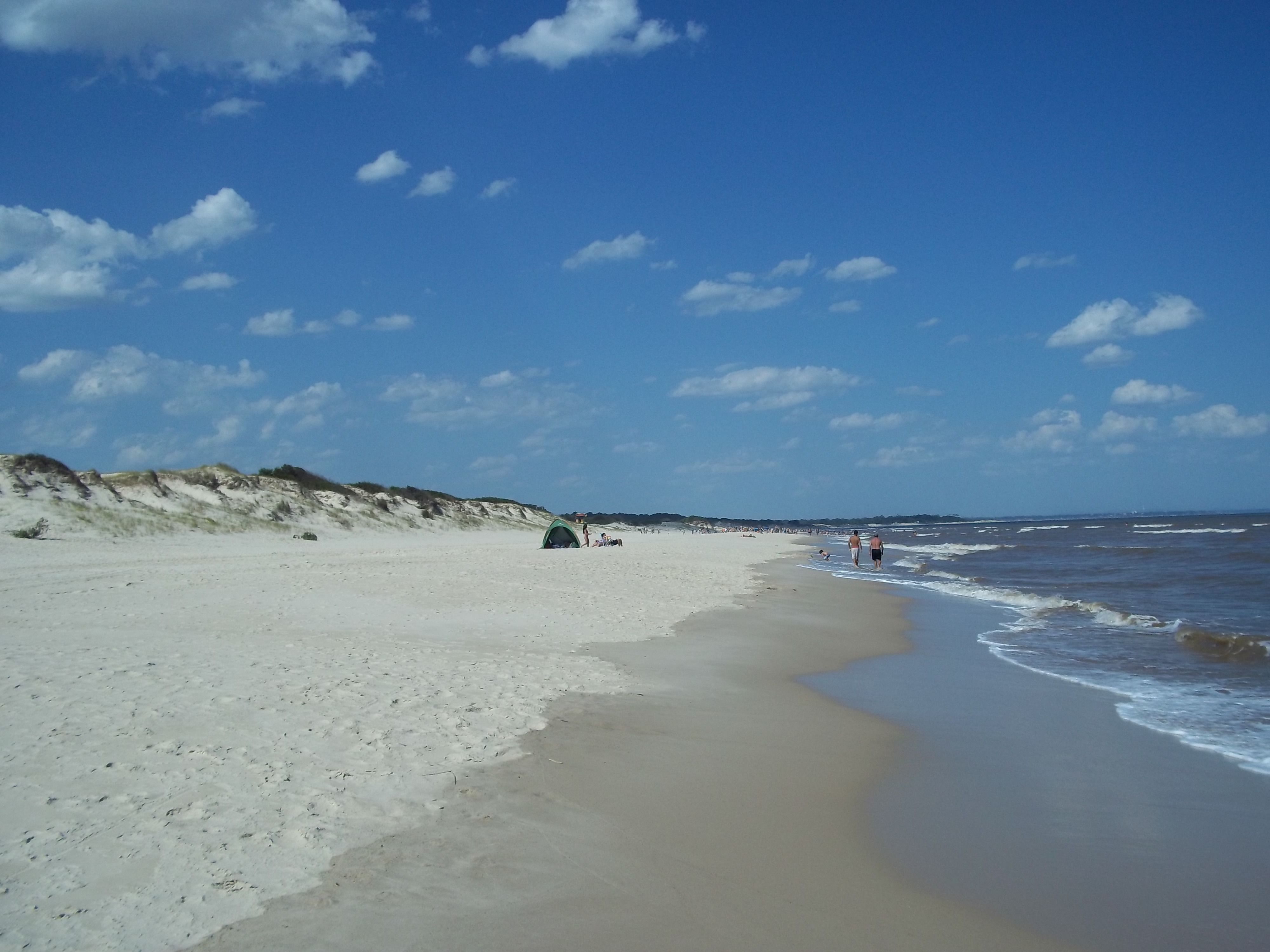 Playa de El Pinar (Ciudad de la Costa, Canelones, Uruguay). Aproximadamente en la bajada 34.